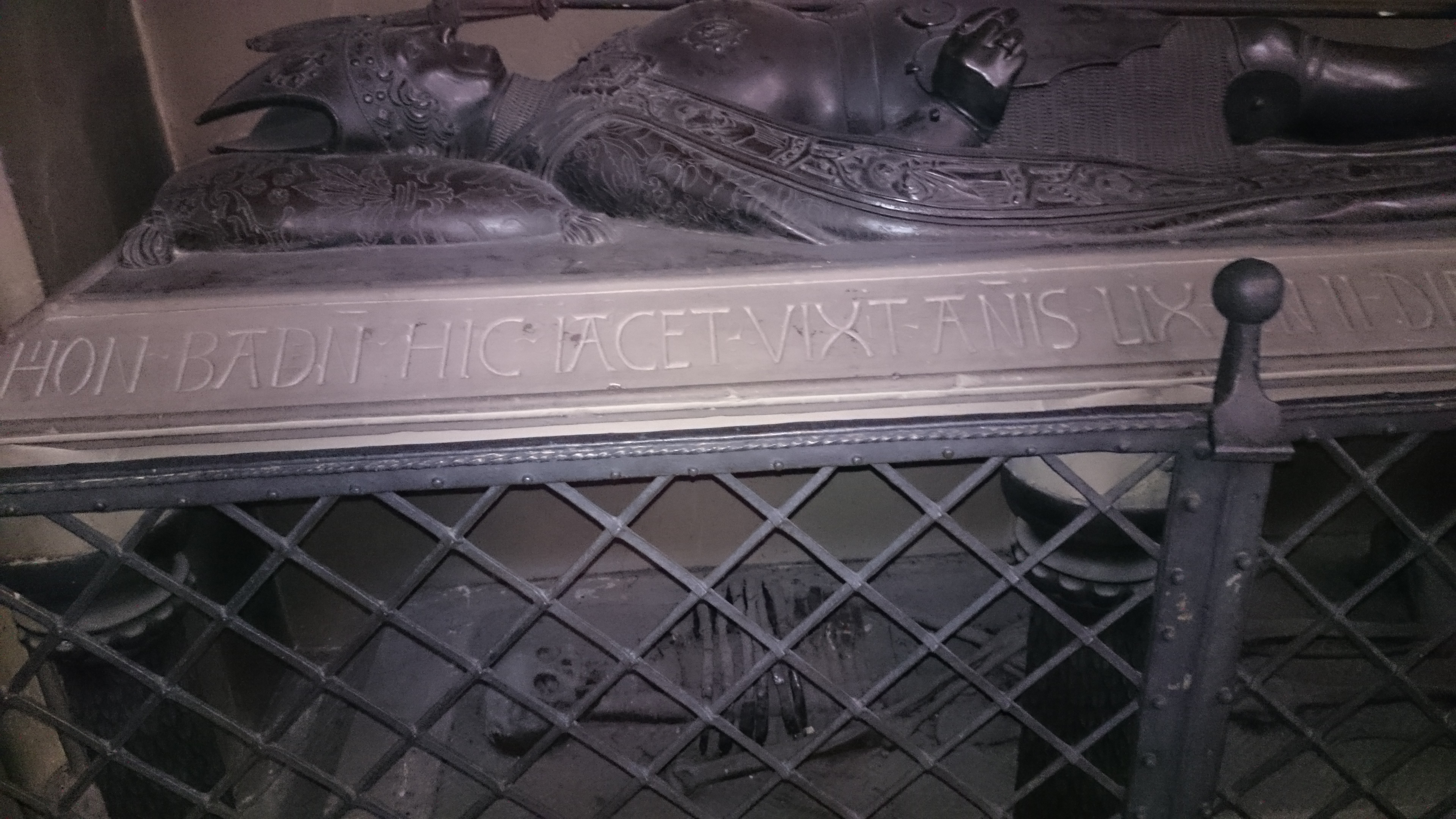 Stiftskirche Baden-Baden, Inneres